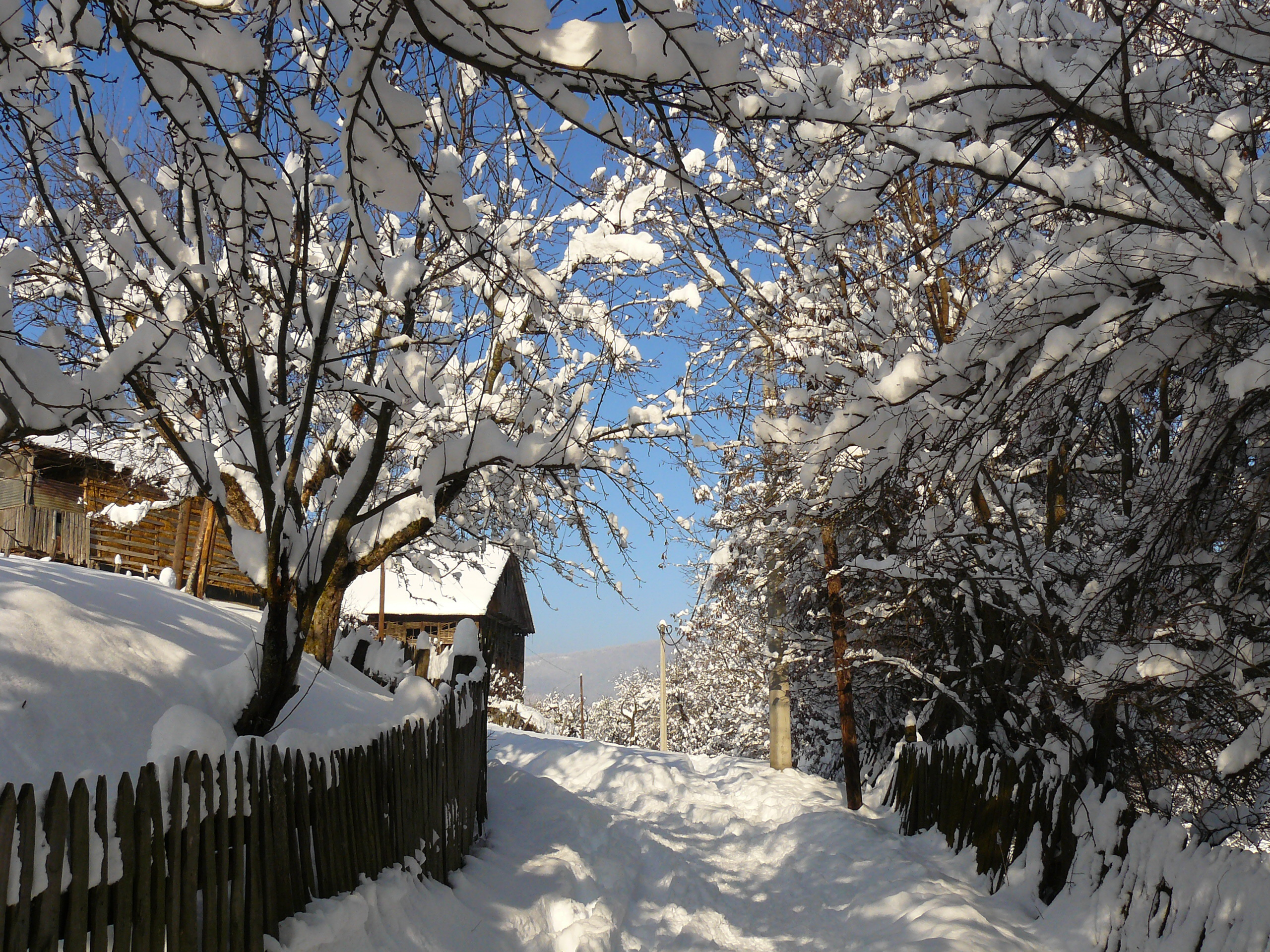 Зима, уличка и ограда